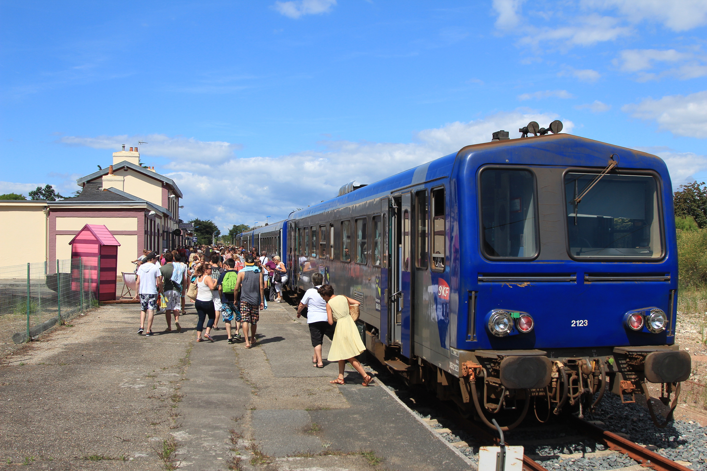 Un TER Bretagne en provenance d'Auray décharge ses nombreux voyageurs, pendant que d'autres montent pour faire le trajet inverse. Au premier plan, l'X 2123